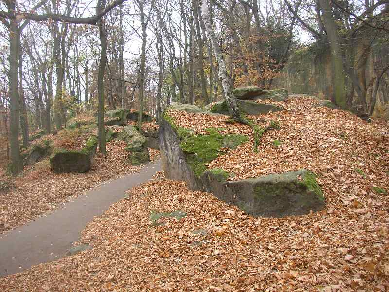 Přírodní památka Petřínské skalky v Praze. Pískovcové skalní městečko v nejhořejší části Kinského zahrady.